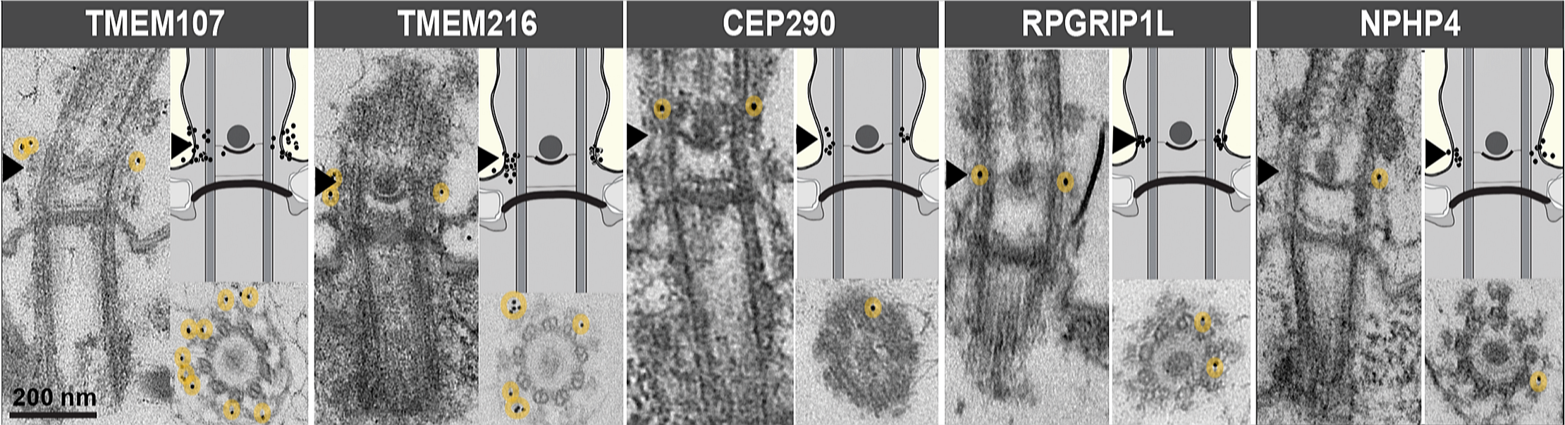 Fig 1. Localization of TZ proteins in Paramecium. (G) Localización de ParameciumProteínas TZ. Imágenes EM representativas de la inmunolocalización de las diferentes proteínas de fusión GFP reveladas por anticuerpos anti-GFP en amarillo. Paneles izquierdos: vistas longitudinales. Paneles inferiores derechos: secciones transversales de BB a nivel de la placa axosómica. Paneles superiores derechos: diagramas BB que recapitulan la localización de cuentas de oro. Todas estas proteínas, aunque ocupan diferentes diámetros en vistas transversales, se localizan al nivel de la placa axosómica indicada por una punta de flecha negra. TMEM107, proteína transmembrana 107; TMEM216, proteína transmembrana 216; CEP290, proteína centrosomal de 290 kDa; RPGRIP1L, Retinosis pigmentaria Proteína GTPasa reguladora-interactuante Proteína 1-Similar; NPHP4, Nefronoftisis 4. Las cuentas de oro se destacan en amarillo. GFP, proteína verde fluorescente; TZ: zona de transición. Barras: 200 nm.